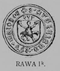 Rawicz Ik